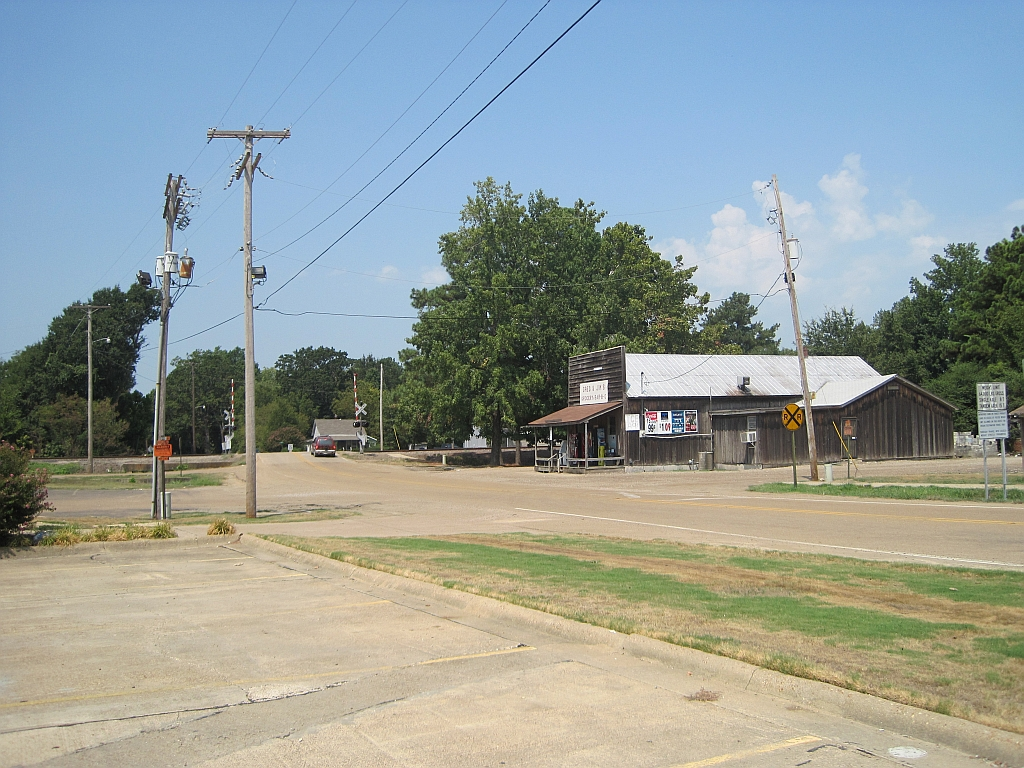 Colt, Arkansas.